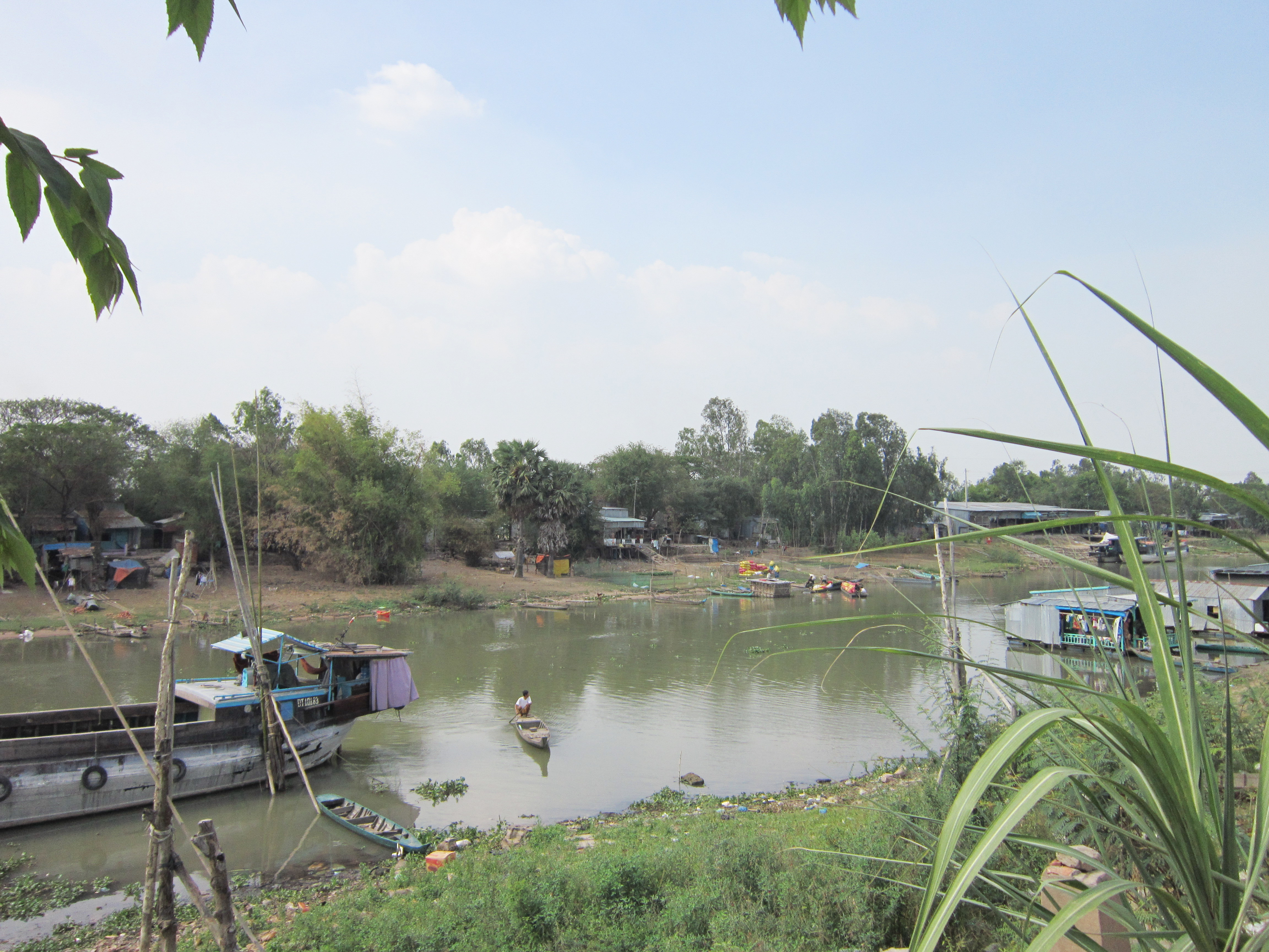 Kênh Vĩnh Tế, đoạn ở phía trước chợ Tịnh Biên, thuộc huyện Tịnh Biên, tỉnh An Giang, Việt Nam.